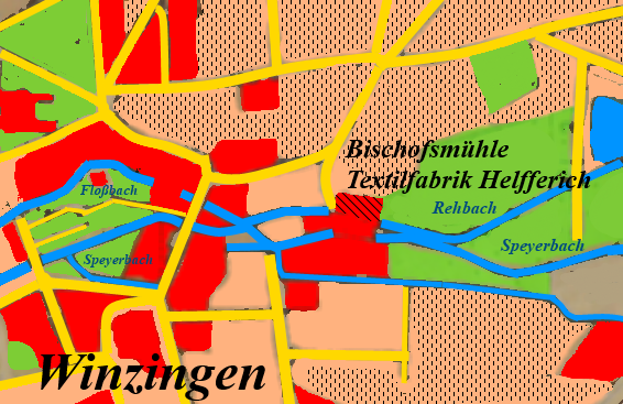 Detailplan Lage Textilfabrik Helfferich